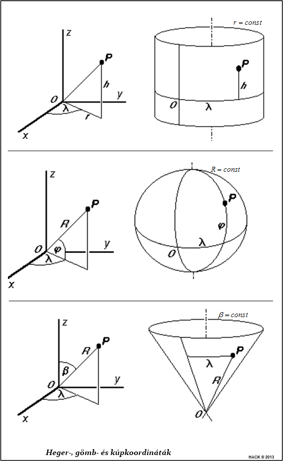 Háromféle polárkoordináta-rendszer